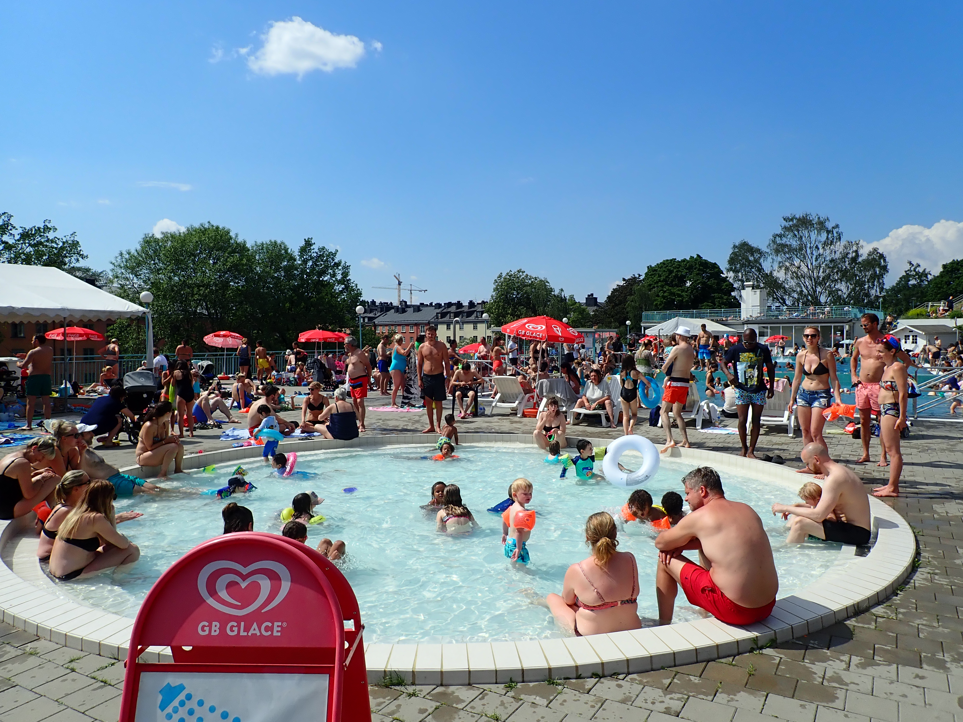 Vanadisbadet